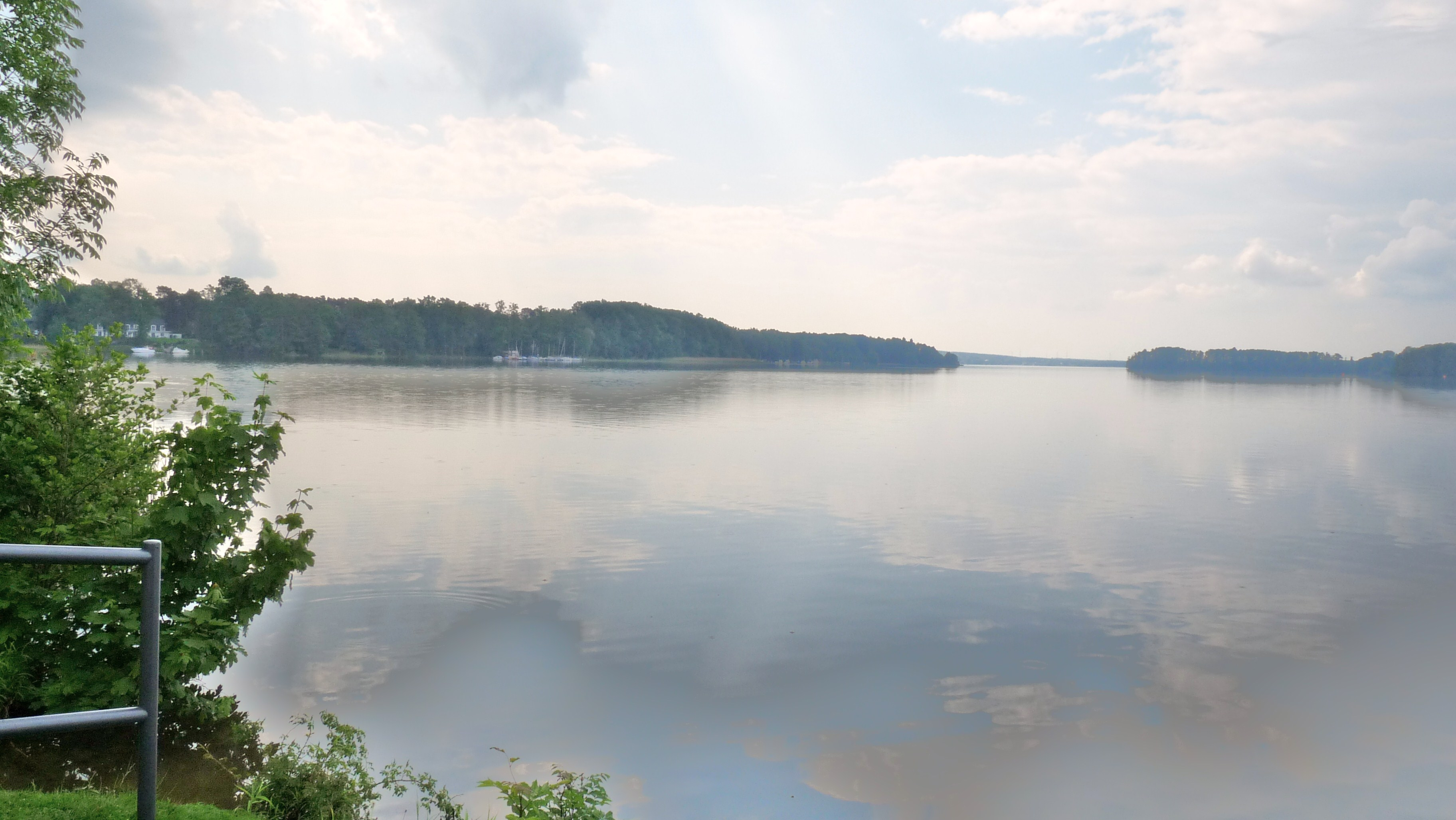 Der Scharmützelsee in Bad Saarow im Mai 2009